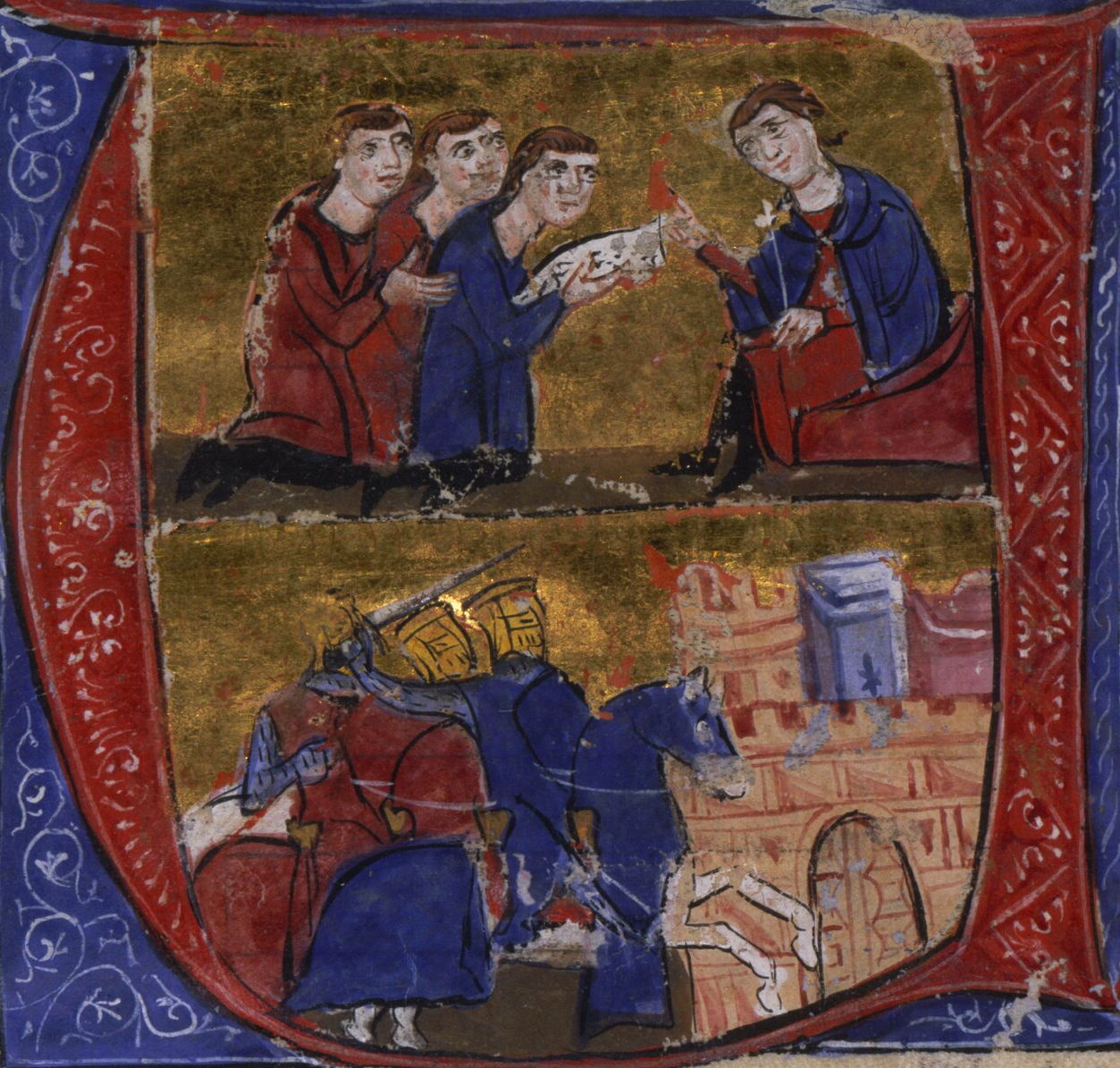 Manuel Ier et les messagers d'Amaury Ier. Arrivée des croisés à Péluse. Israël, Acre, XIIIe siècle.